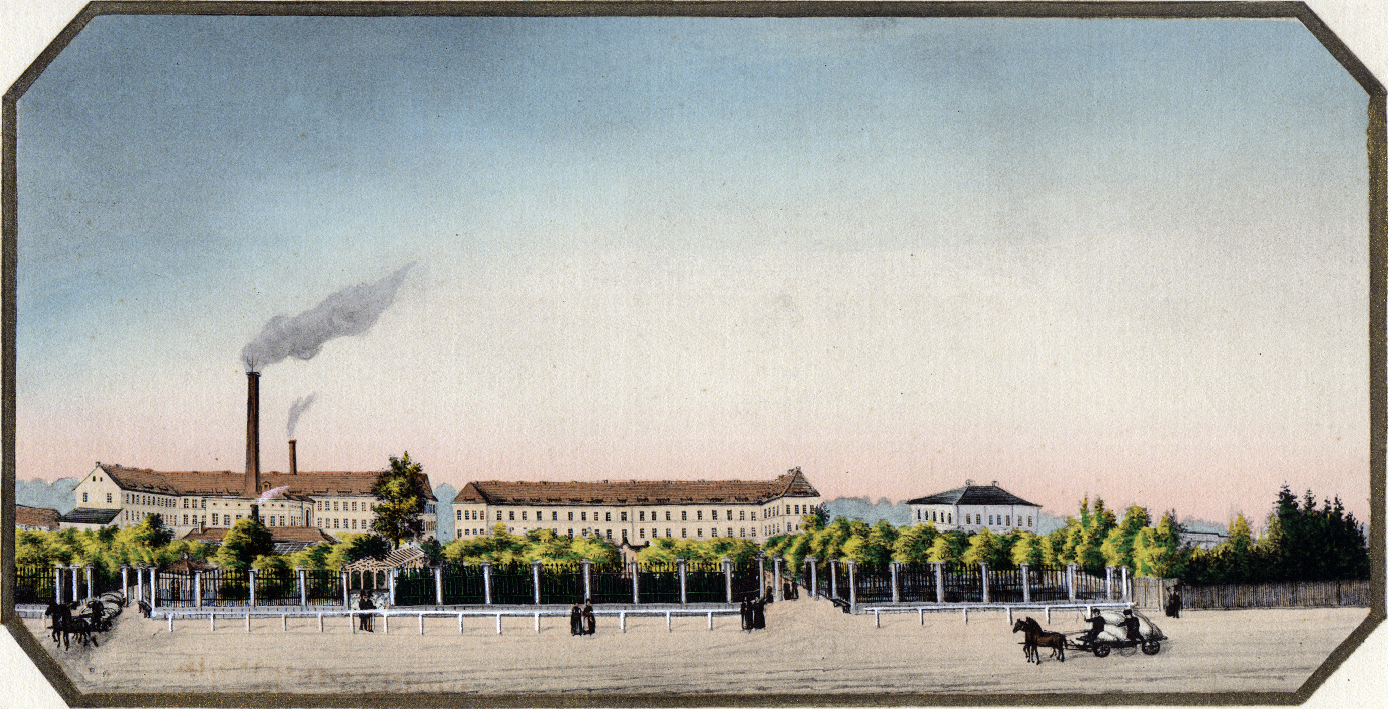 „Leipziger Kammgarnspinnerei in Pfaffendorf bei Leipzig. Gegen 1840.“